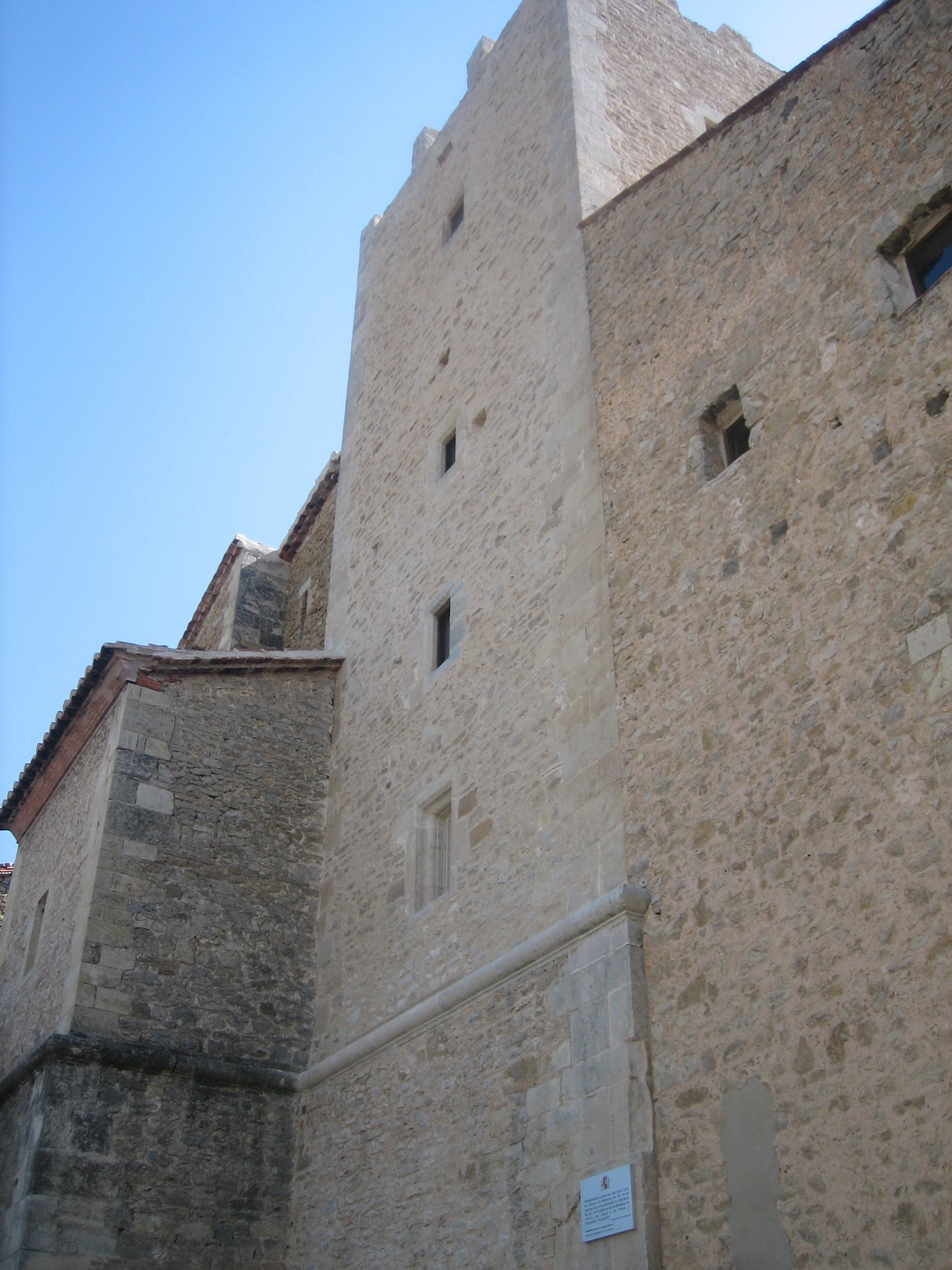 Torre de Conjurar de Vilafranca (Alt Maestrat)